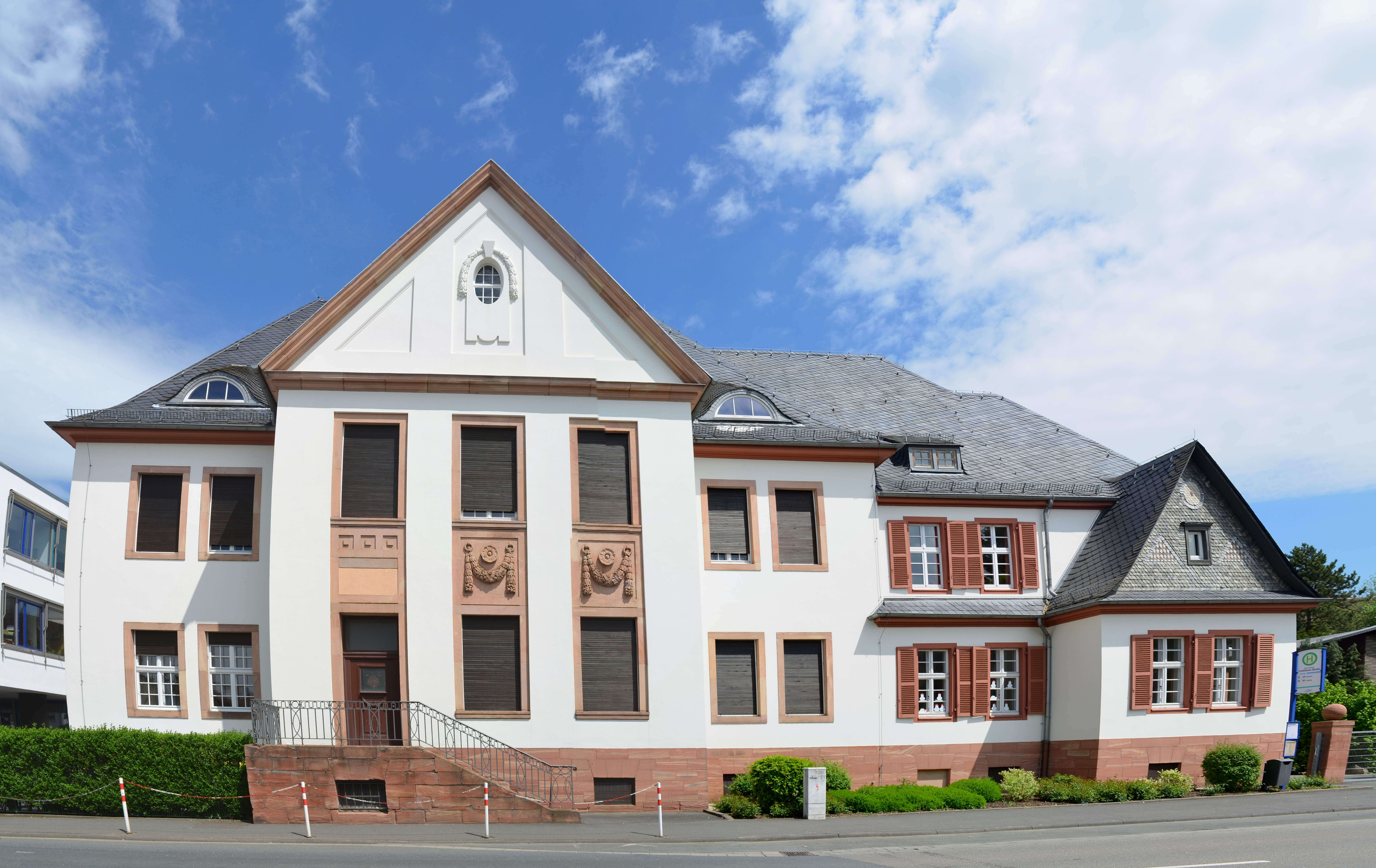 Bad Camberg, altes Amtsgericht